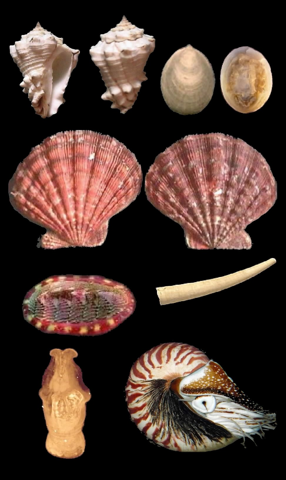 Moluscos de las clases Gastropoda, Monoplacophora, Bivalvia, Polplacophora, Scaphopoda, Aplacophora y Cephalopoda